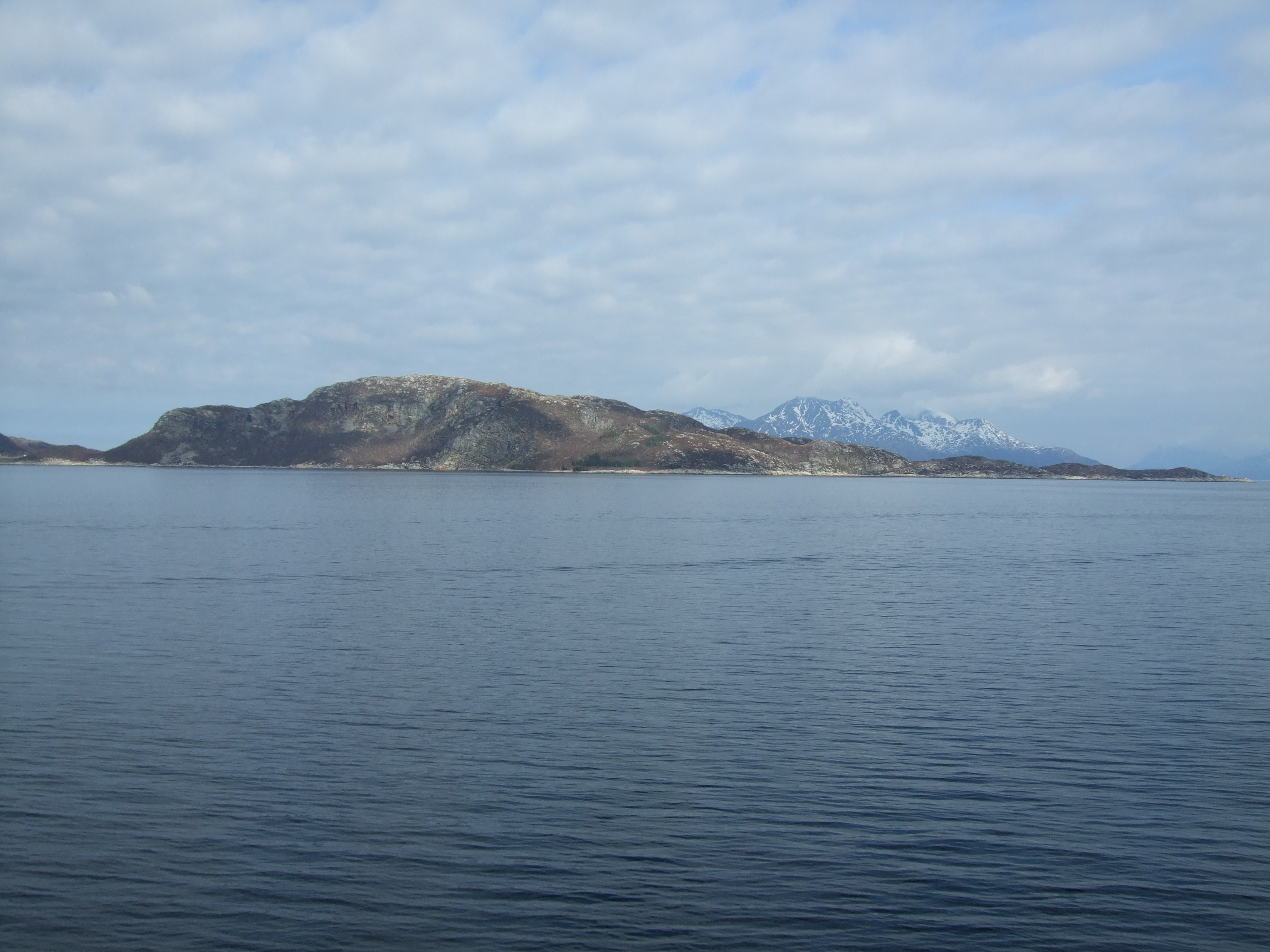 Løkta sett frå søraust